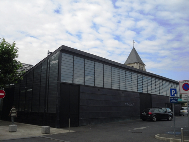 La halle du marché du centre à Draveil (91)